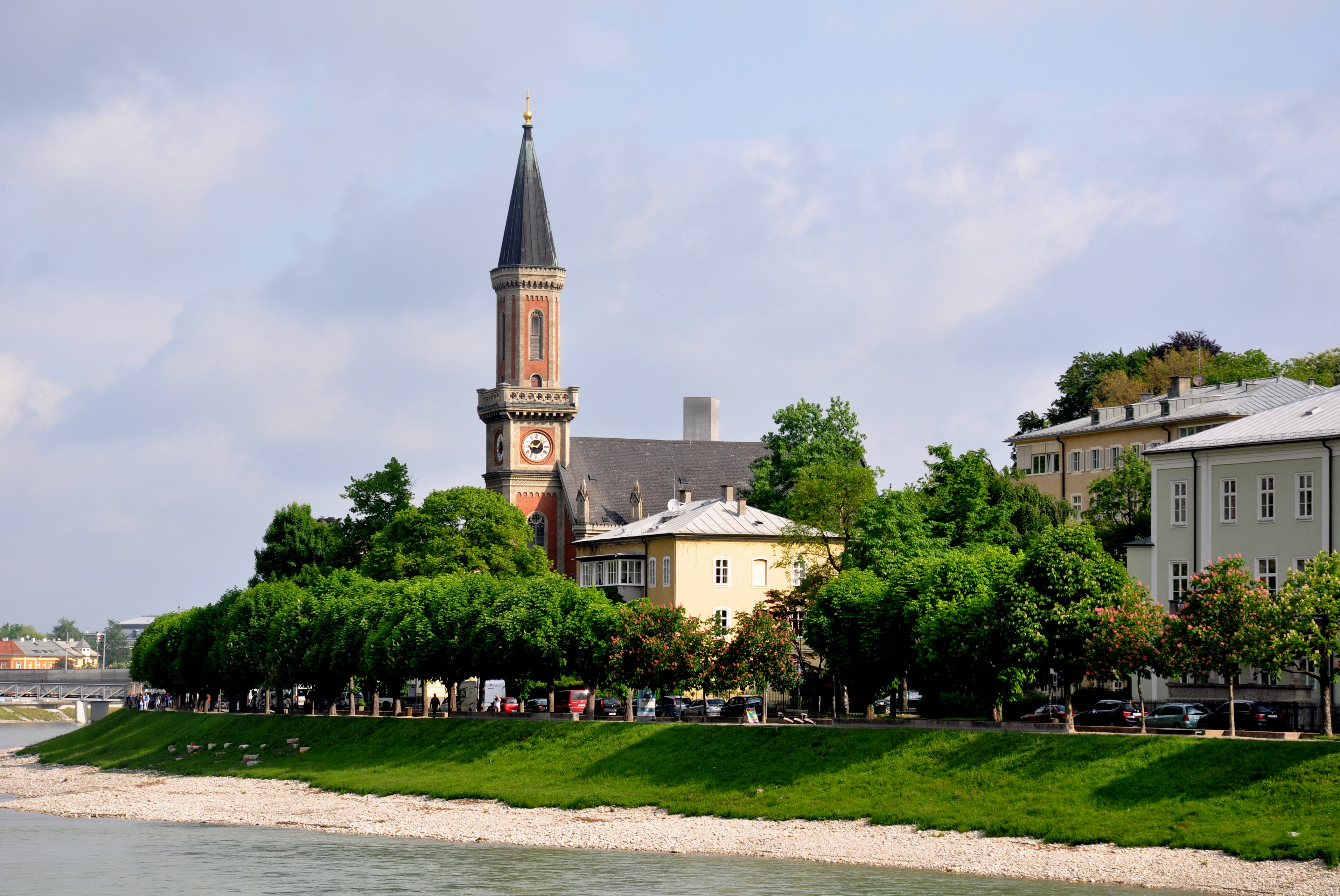 Salzburg, ev. Christuskirche